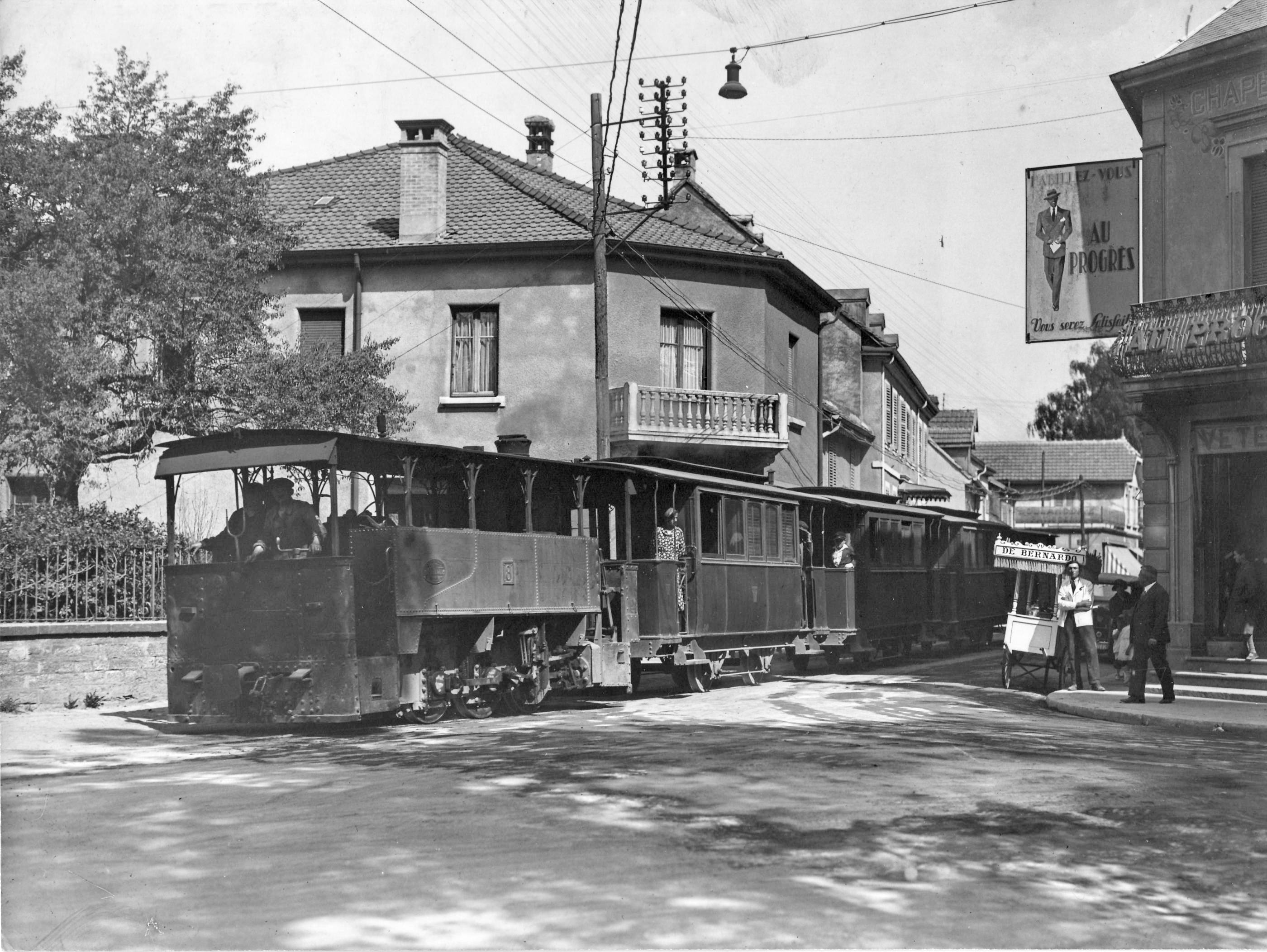 Photo légendée "Tramway_de_la_Vallée_d'Hérimoncourt_(Doubs)", prise avant 1932 (année de suppression de la ligne), probablement à Audincourt.La locomotive bicabine porte le n°8 et a sans doute été construite par Buffaud & Robatel voire plutôt la Métallurgique.